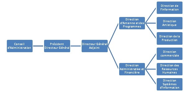 Organigramme de Radio IFM au 01/09/2012